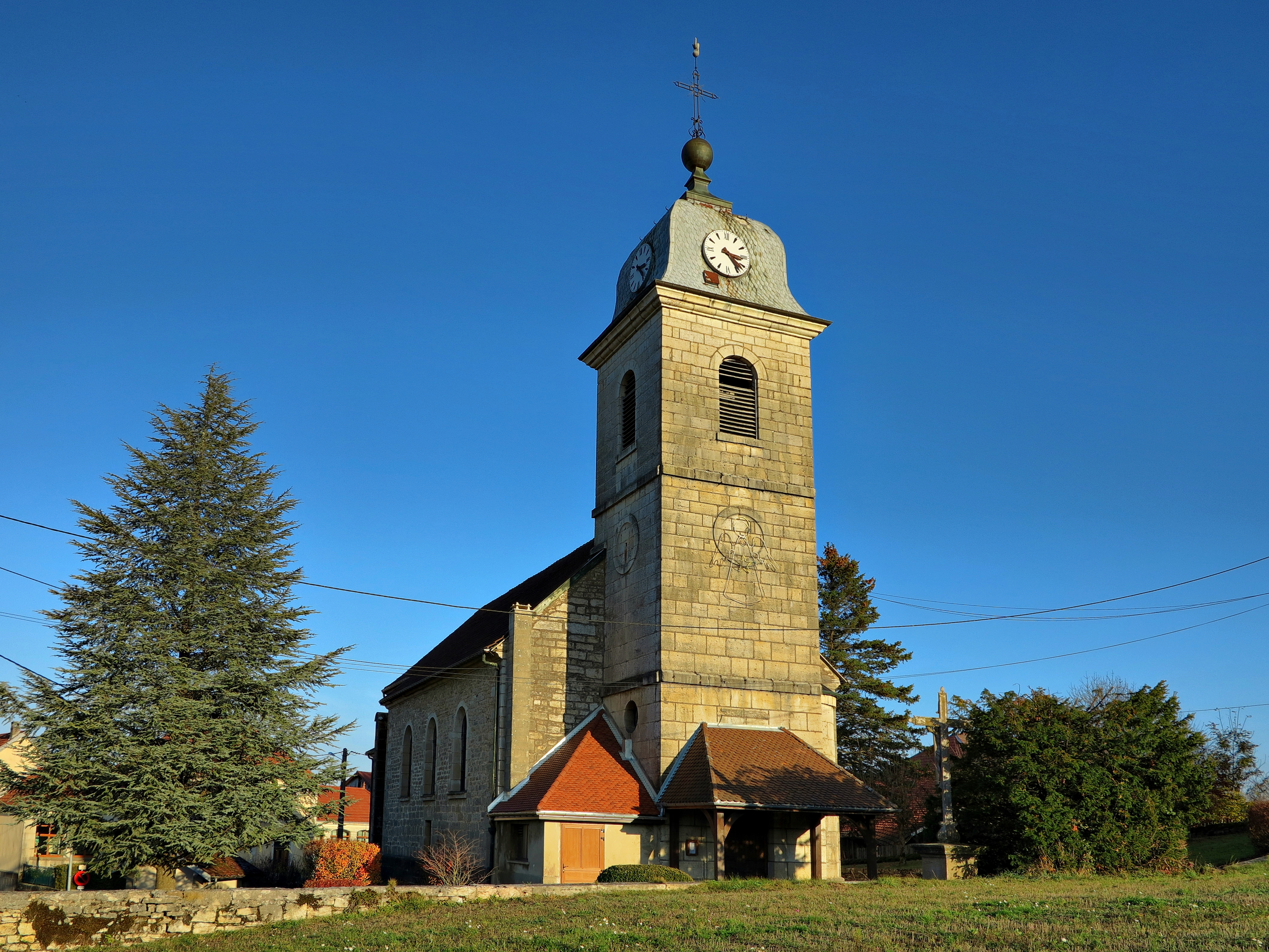 L'église